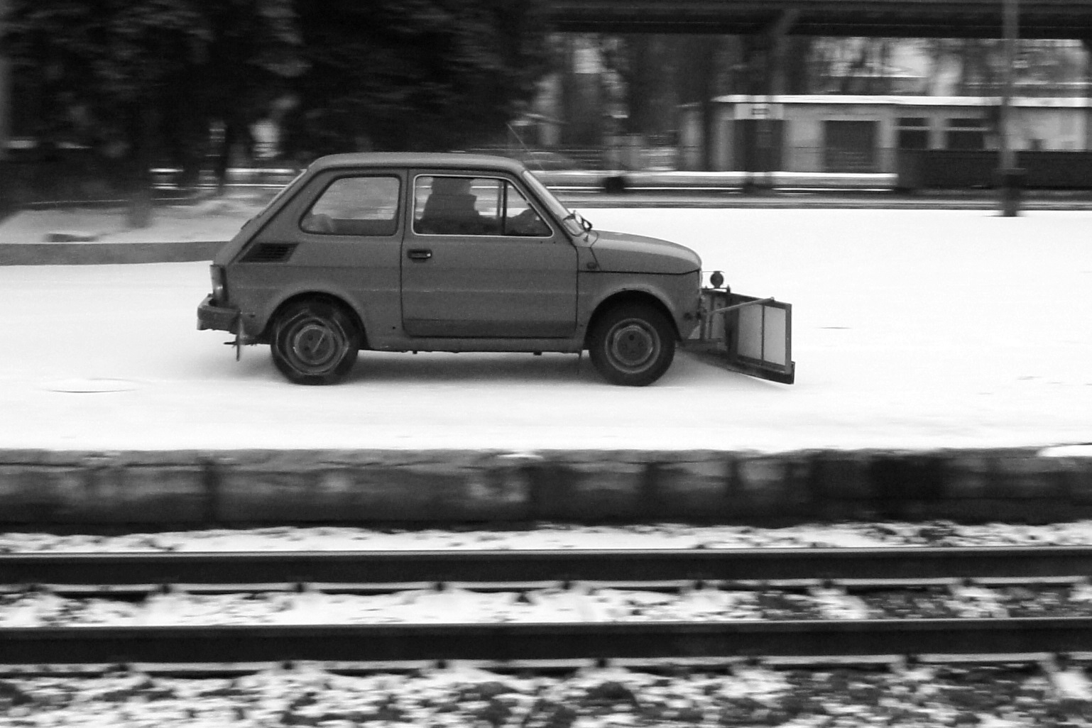 PF 126p - pług śnieżny, w trakcie pracy na peronie stacji kolejowej w Krzyżu Wielkopolskim, w styczniu 2014 r.